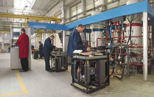 Hala produkcyjna WSK KRAKÓW Sp. z o.o.